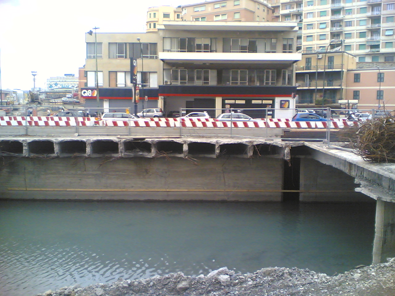 Lavori di messa in sicurezza del torrente Bisagno in Viale Brigate Partigiane a Genova, quartiere della Foce, di fronte alla palazzina razionalista (parzialmente demolita nel 1965) progettata da Mario Labò che ospitava il "Ristorante San Pietro".